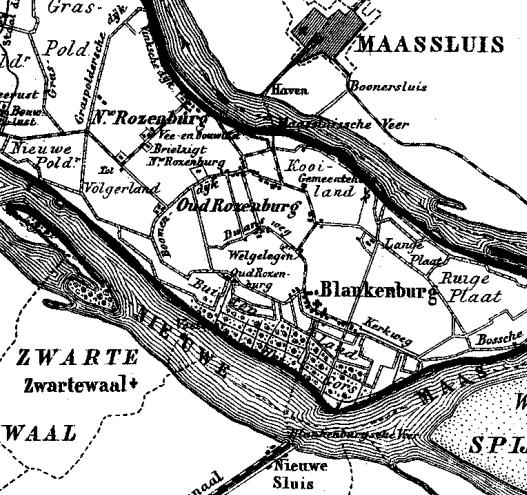 Blankenburg in 1867. Detail uit de gemeentekaart van Rozenburg